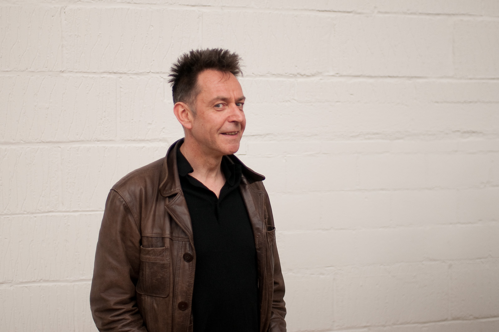 Namahn Event 5 May 2009